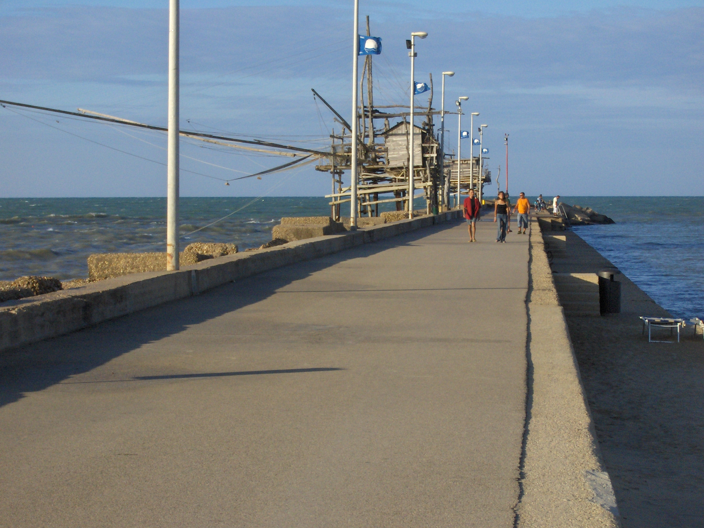 Il piccolo porto di San Vito.